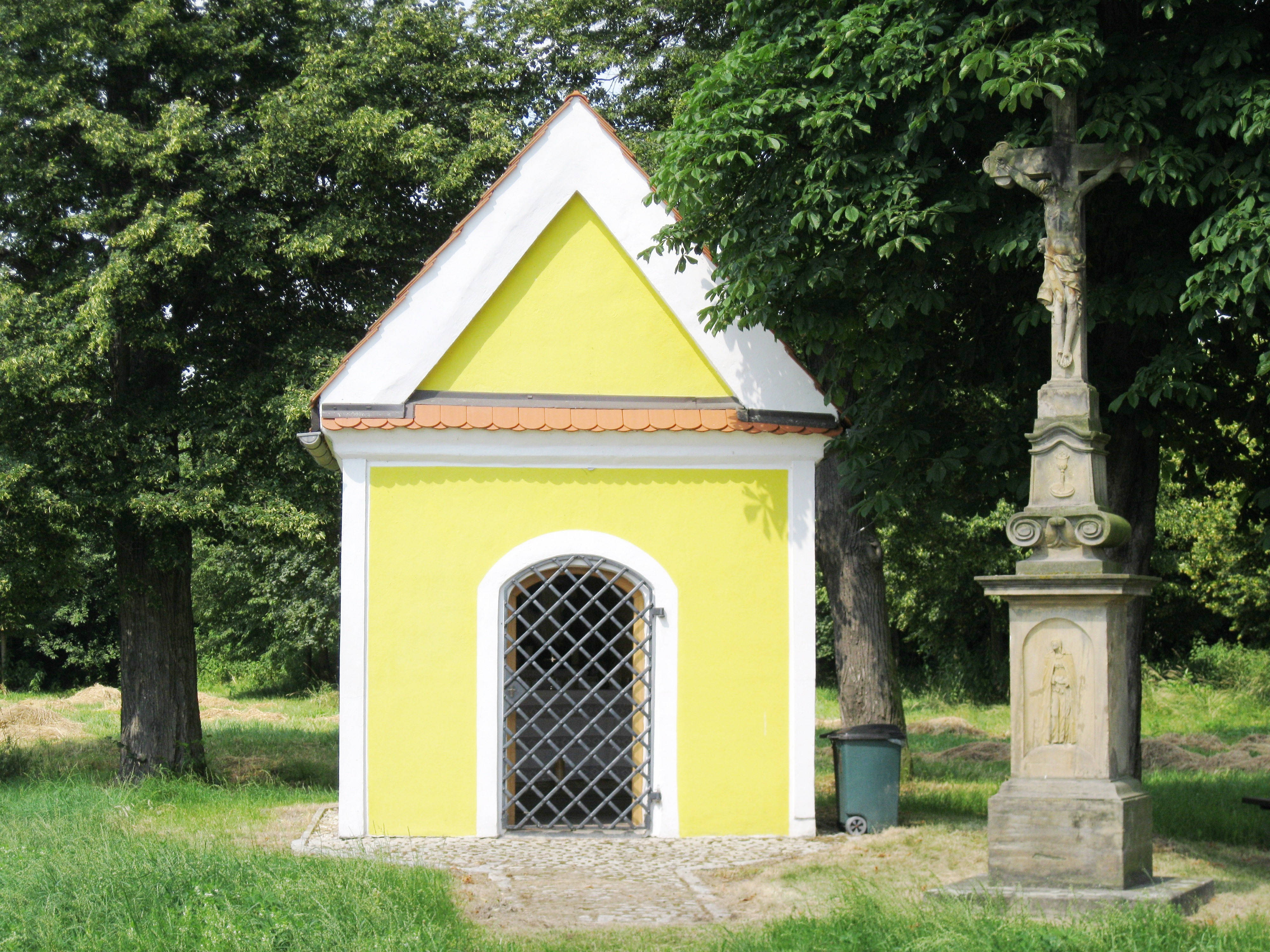 Kaple P. Marie Bolestné (Štarnov), J okraj obce, Štarnov